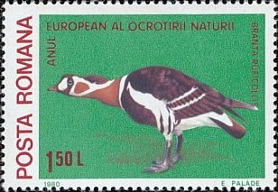 Source: Post of Romania